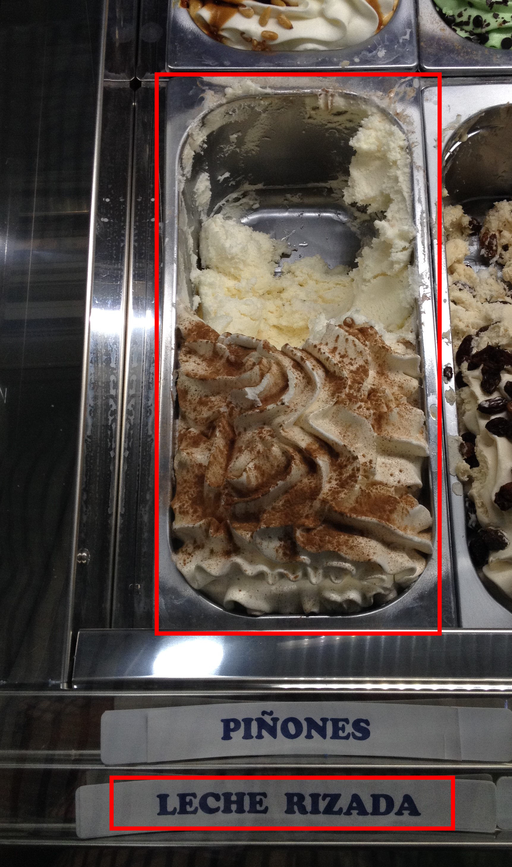 Fotografía de helado de leche rizada